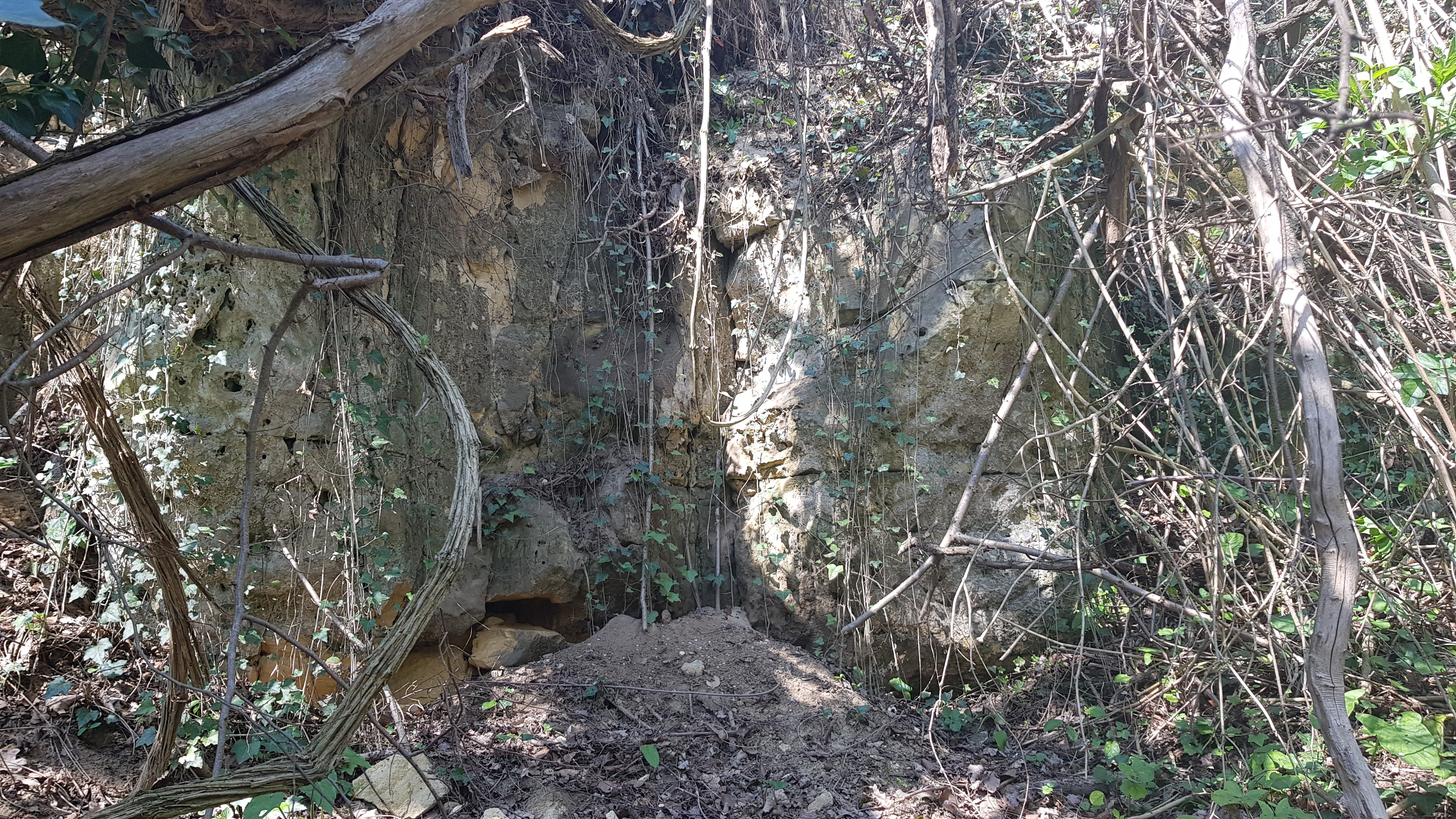 Groeve naast Beckersbergske, Valkenburg, Nederland